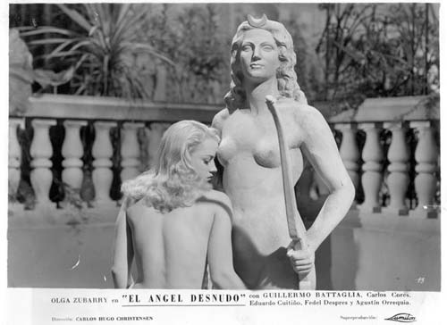 Fotografía blanco y negro sobre papel fotográfico brillante marca Ridax, con marco perimetral blanco, en cuyo borde inferior se hallan impresos los datos del El ángel desnudo. Plano corto de medio cuerpo de la protagonista Olga Zubarry, desnuda y de espaldas en una terraza. La actriz, con el rostro de perfil derecho, se halla sentada por delante de una estatua femenina desnuda con una media luna en la frente y un arco en la mano. Por detrás, una baranda semicircular de mampostería, y al fondo, vegetación.